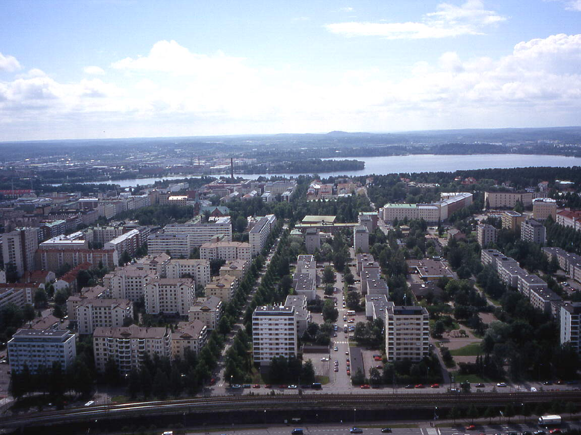 Blick auf die westliche Innenstadt von Tampere, de:6. Juli de:2004. Sichtbar wird auf diesem Bild besonders der schachbrettartige Aufbau der Altstadt. Die Aufnahme entstand auf dem Näsinneula-Turm. Der See im Hintergrund ist der Pyhäjärvi. Nikolaus Drees, Sundern (Upload genehmigt)